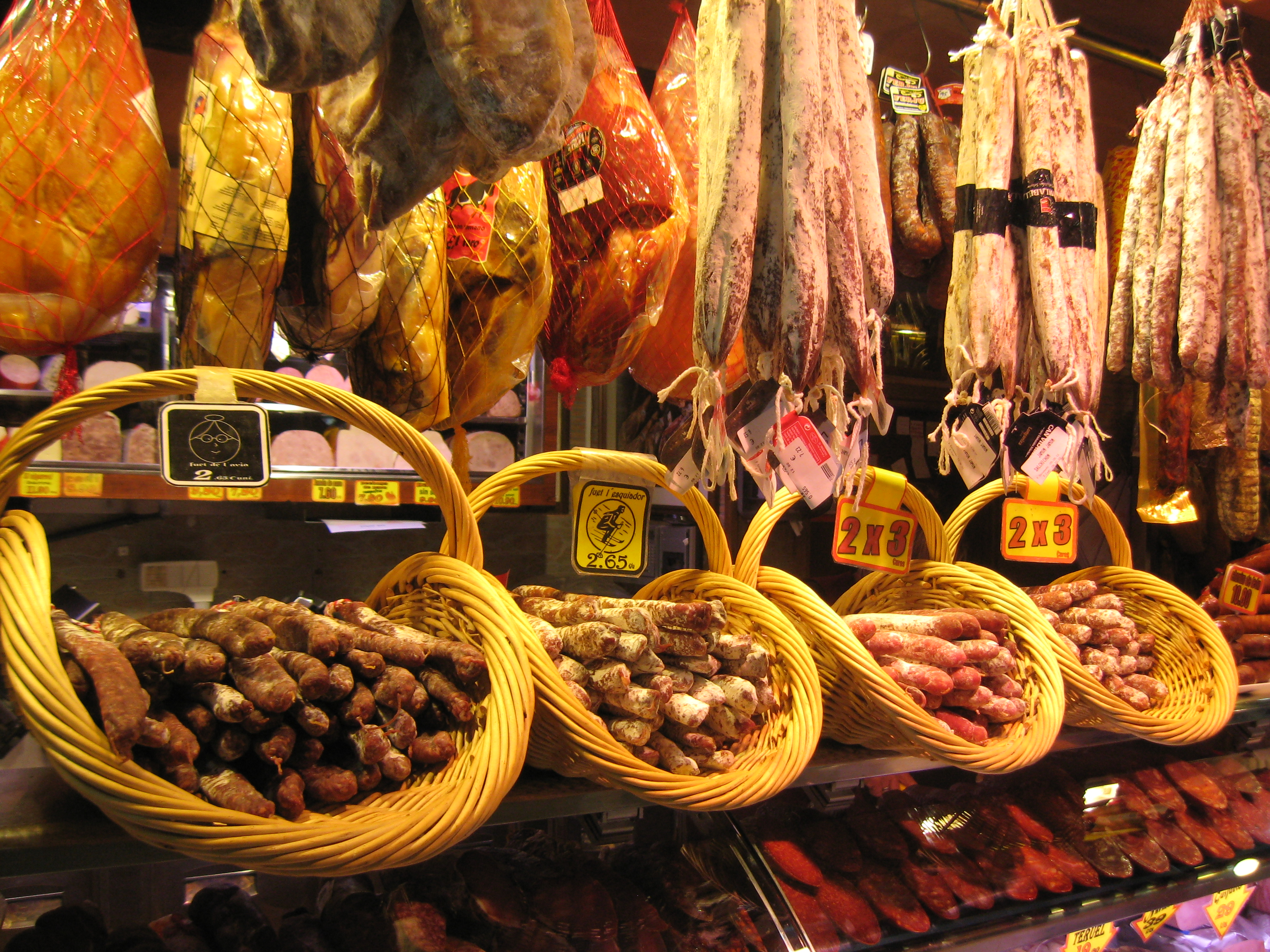 Wurst und Schinken in der Markthalle von Roses. Datum: 08.09.2010 Urheber: Michael Pfeiffer alias Benutzer:Gordito1869 Quelle: privates Fotoarchiv des Urhebers